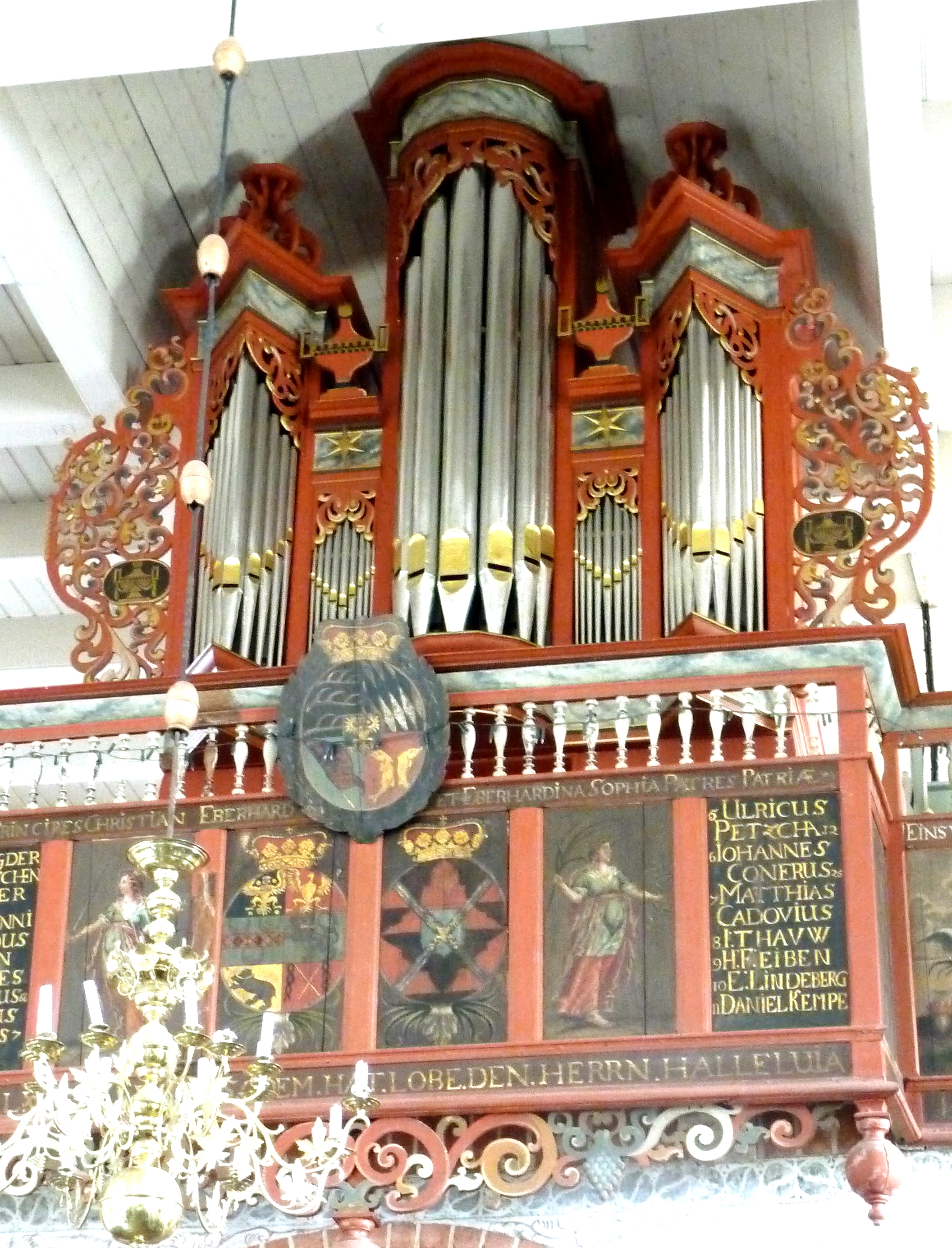 Orgel in Buttforde, Ostfriesland, nach der Restaurierung 2012